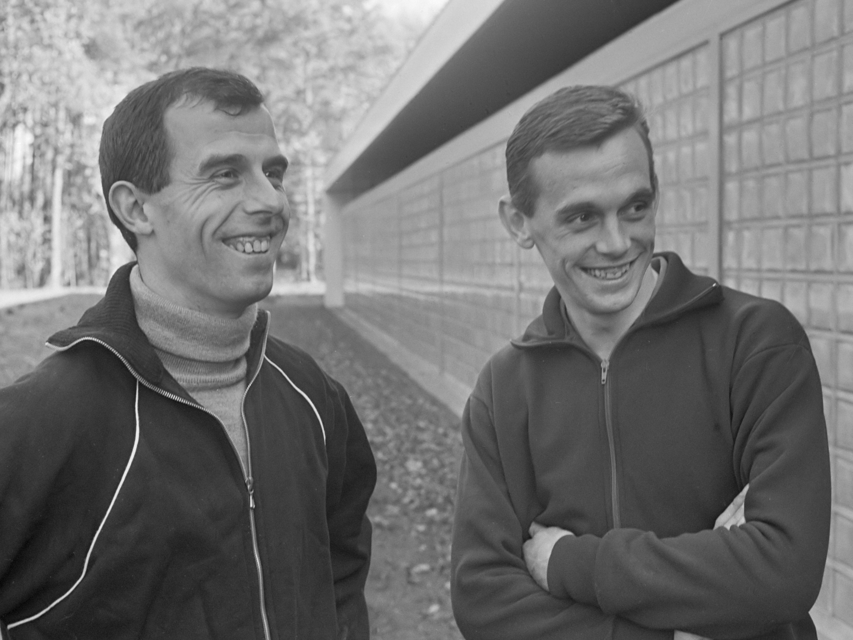 Training van het Nederlands Elftal. Voetballer Coen Moulijn met de nieuweling Miel Pijs van PSV 3 november 1965